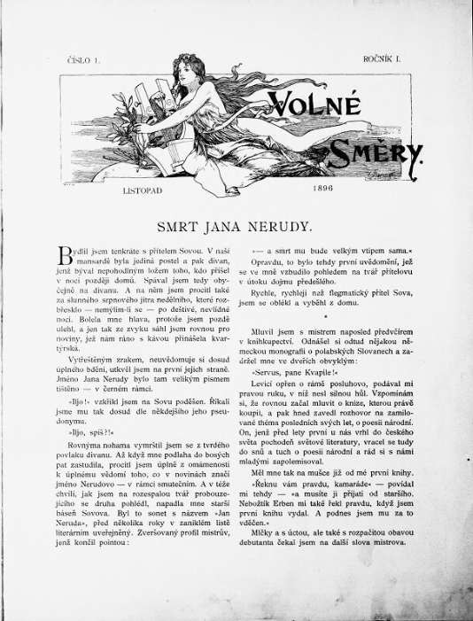 časopis Volné směry. První číslo prvního ročníku (listopad 1896)